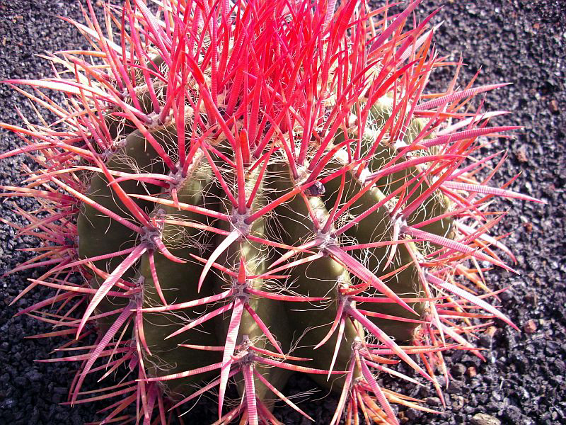 Ferocactus haematacanthus